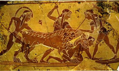 Сцэна палявання з Вазы Кіджы